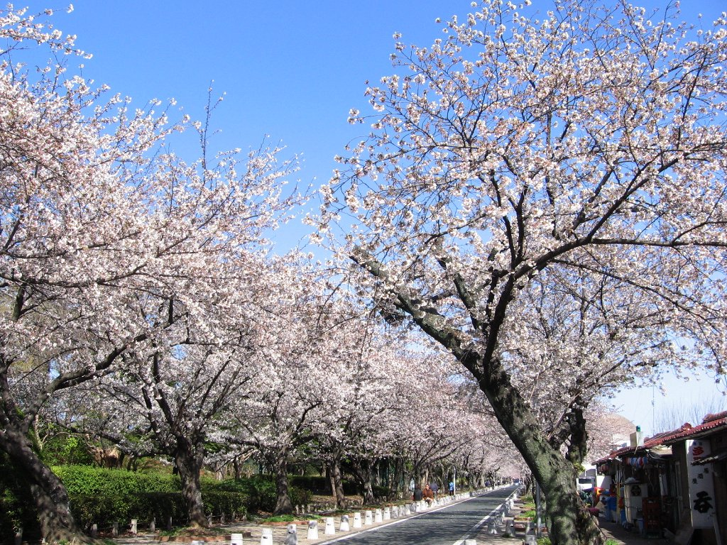 豊川市の桜トンネル西端